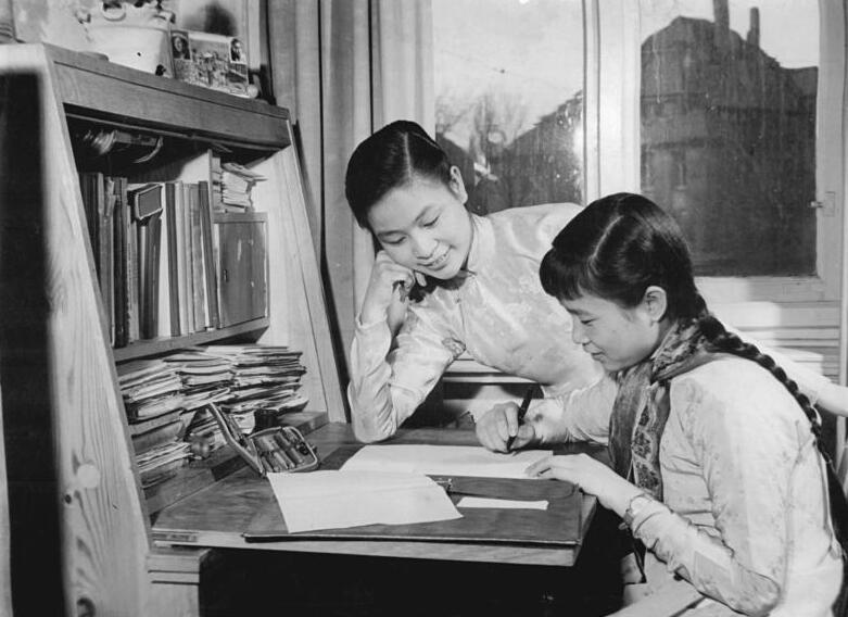 Leipzig, vietnamesische Studentinnen Zentralbild Schmidt 16.4.1958 vietnamesische Studenten studieren in der Deutschen Demokratischen Republik. Das Kulturabkommen, das zwischen der Deutschen Demokratischen Republik und der Demokratischen Republik Vietnam abgeschlossen wurde, ermöglicht 18 Söhnen und Töchtern vietnamesischer Arbeiter und Bauern, in der DDR zu studieren. Sie sind im Internat des Instituts für Ausländerstudium in Leipzig untergebracht und lernen zunächst die deutsche Sprache, um sich dann im Studium in Chemie, Mathematik, Physik, Biologie, Gesellschaftswissenschaft und Sport Fachwissen anzueignen. UBz: Täglich hat Frau Tran Thi Vaong Post zu beantworten. Ob ihr Gatte, Freunde, Verwandte und Bekannte - sie alle wollen über das Leben in der DDR unterrichtet sein.